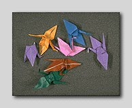 Origami